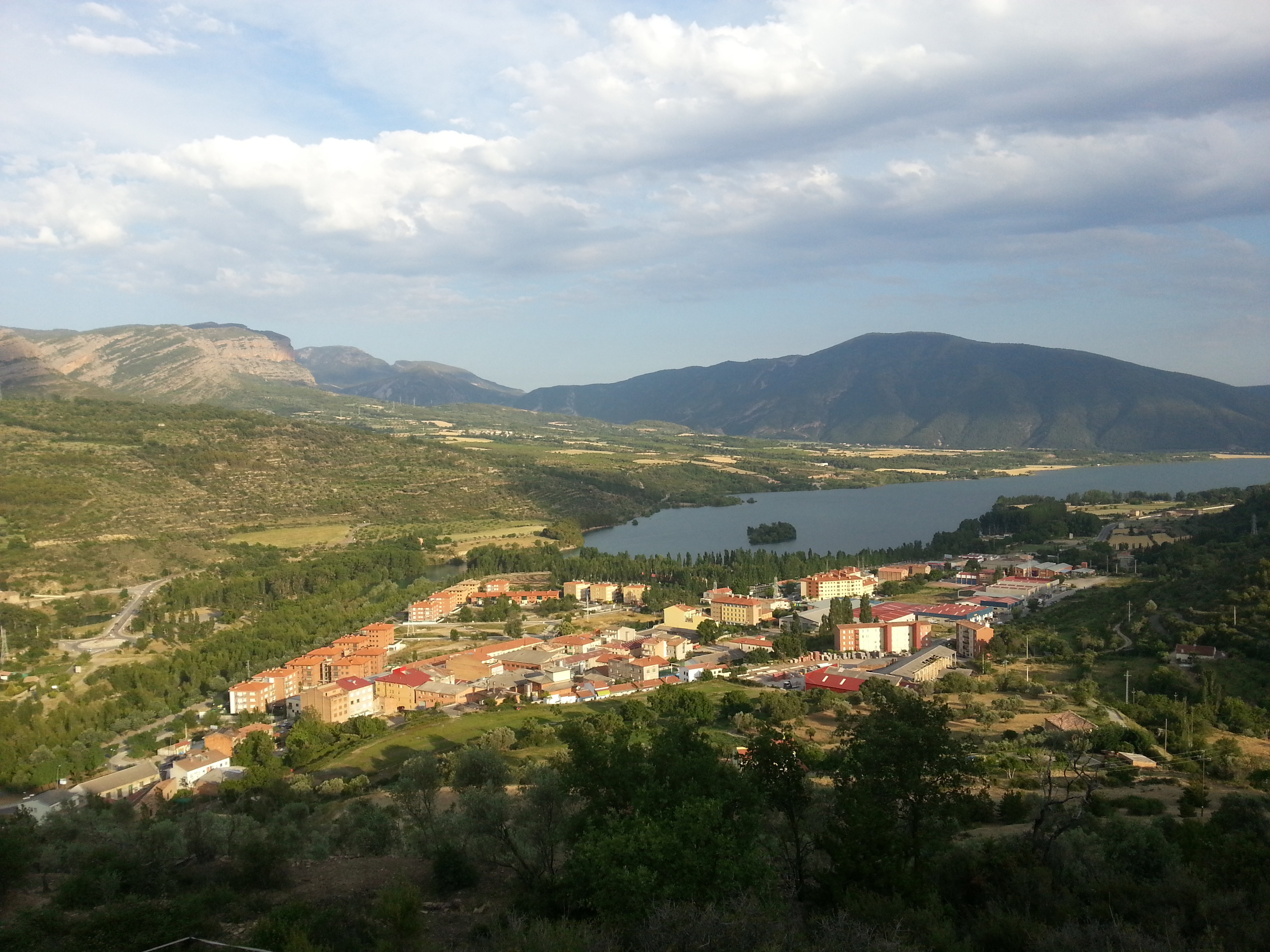 Vista de la Pobla de Segur des del monte de Santa Magdalena